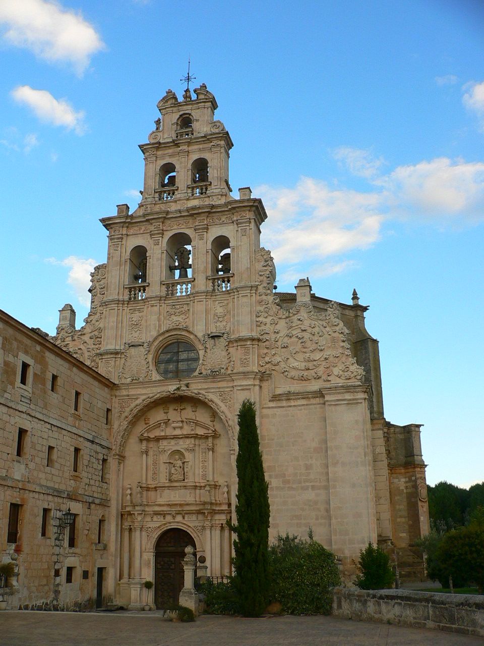 Monasterio de La Vid / La Vid Monastery, Burgos, Spain